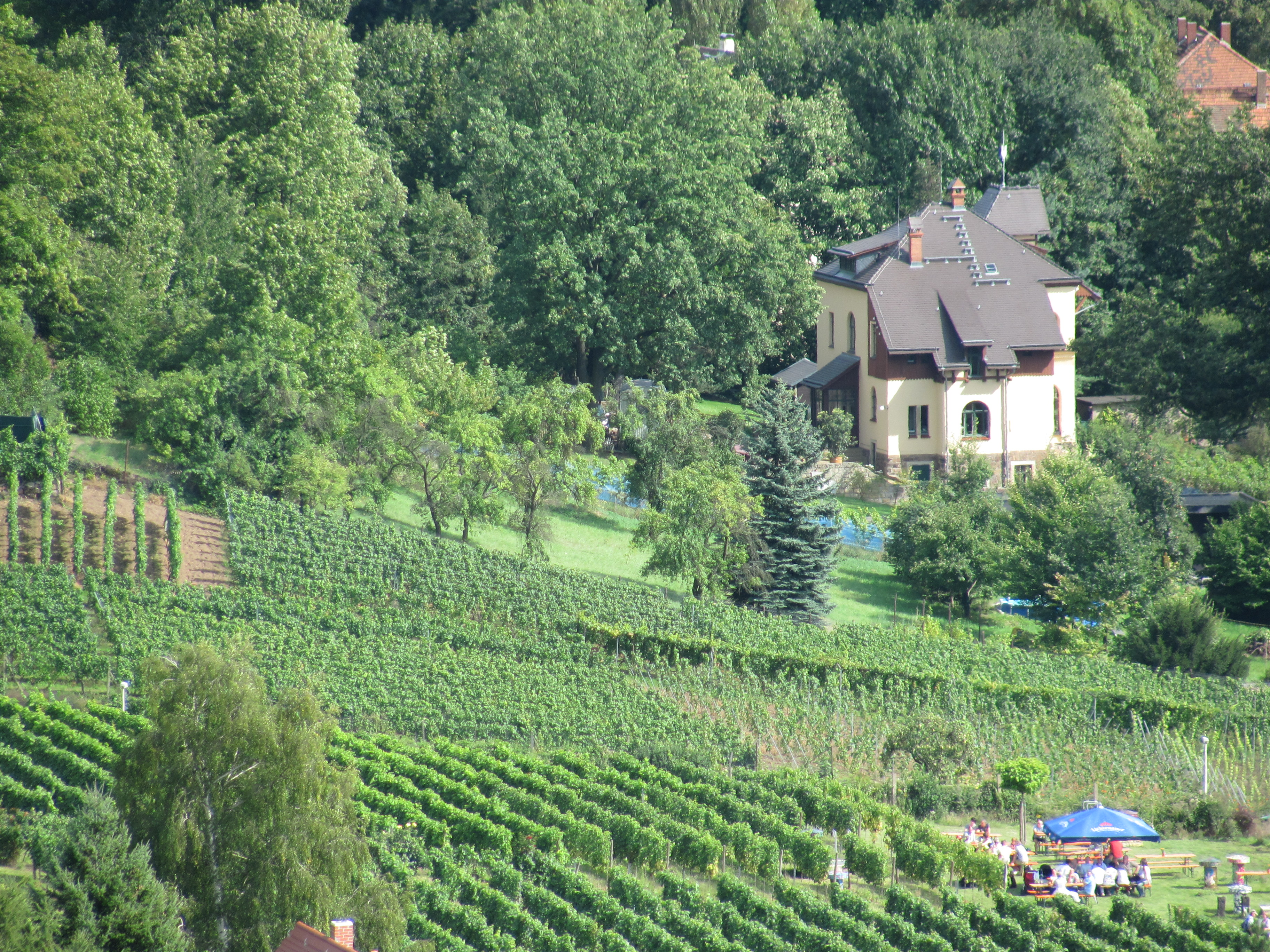 Radebeul Villa Oswald Haenel vom am Hang gelegenen Eggersweg aus, am Tag des offenen Weinguts 2014. Rechts unten Ausschank und Weinberg von Winzerhaus Barth